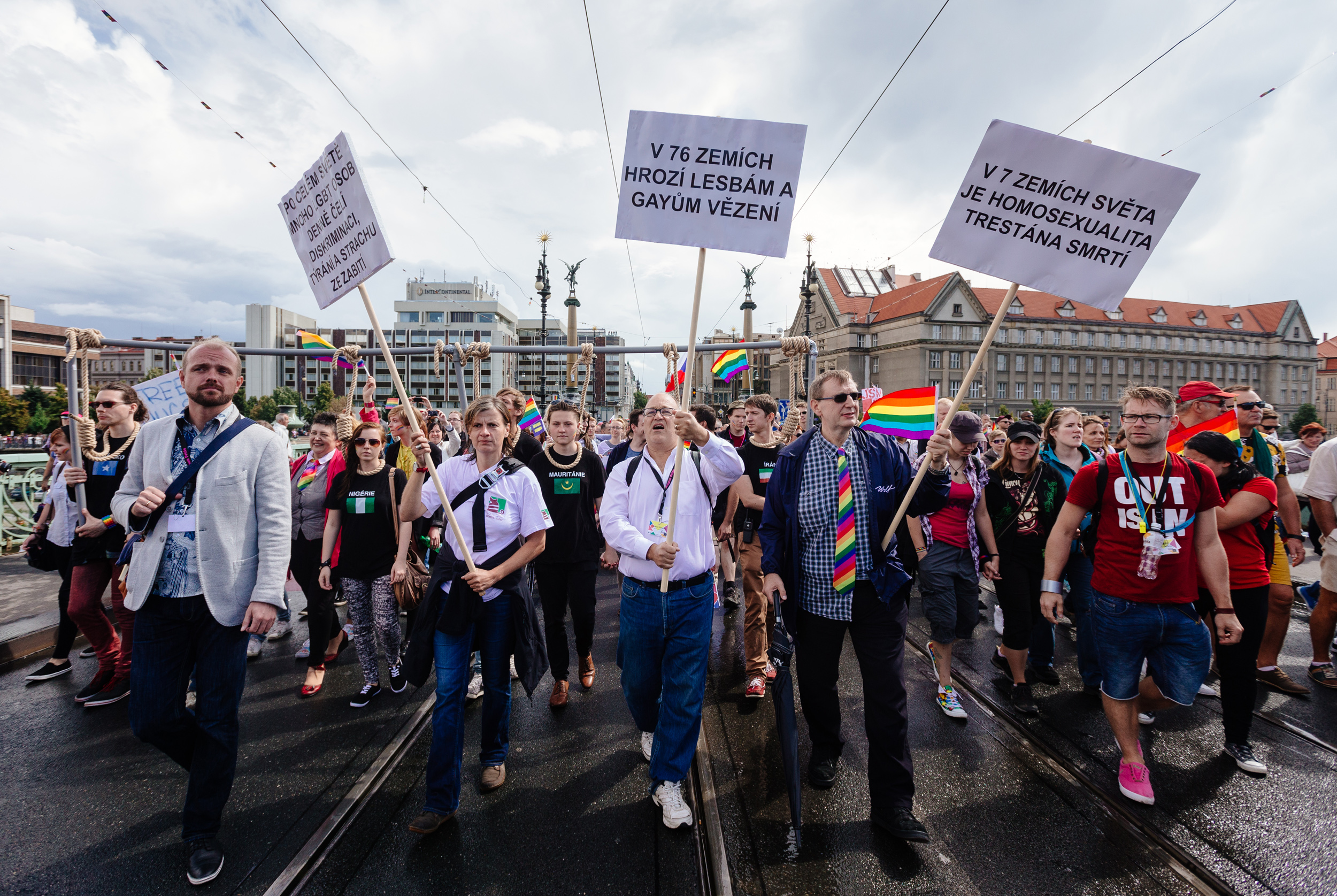 Prague Pride 2014, čelo průvodu na Čechově mostu, zleva Czeslaw Walek, Markéta Hronková, (?), Jiří Hromada